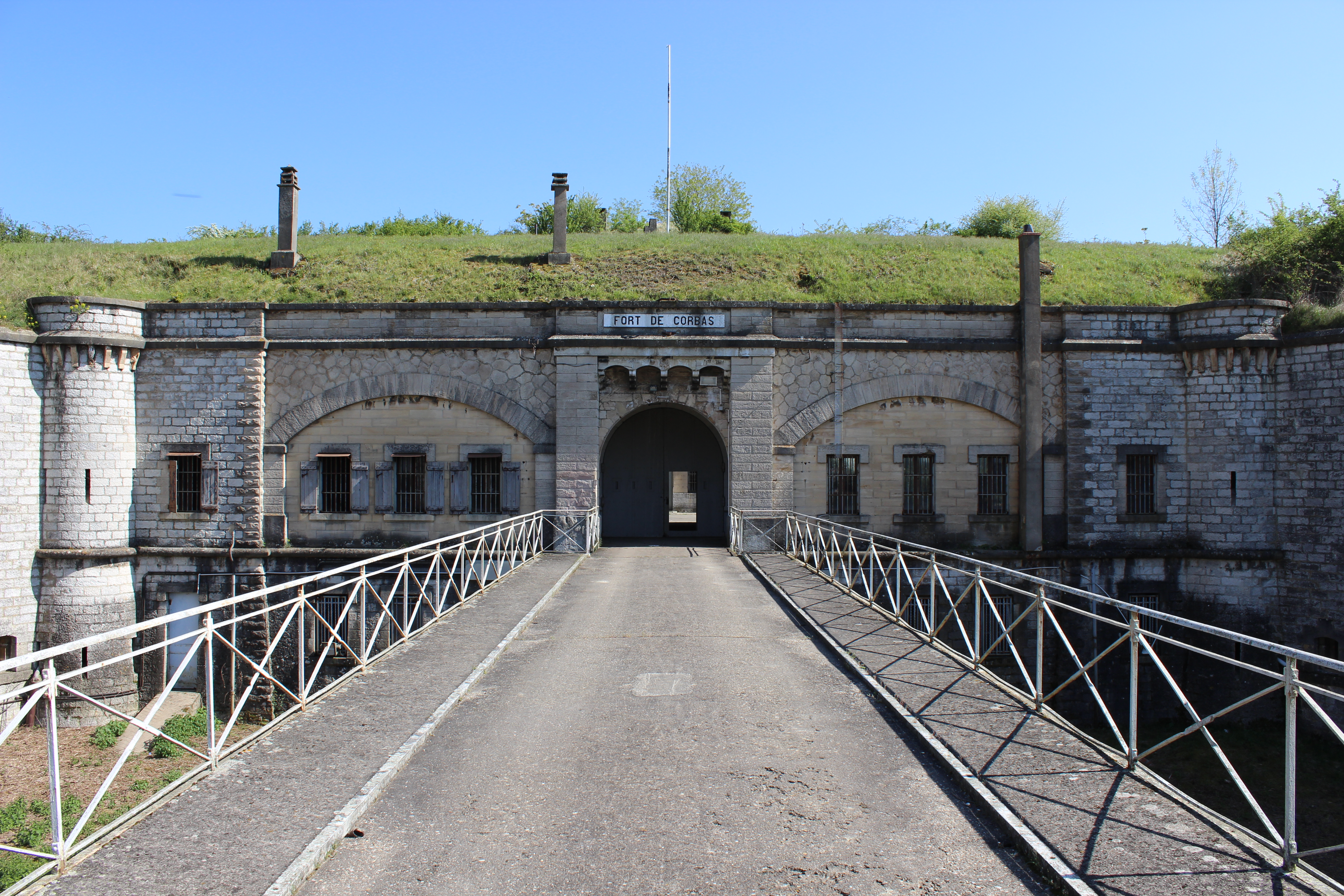 Pont dormant et entrée du Fort de Corbas.